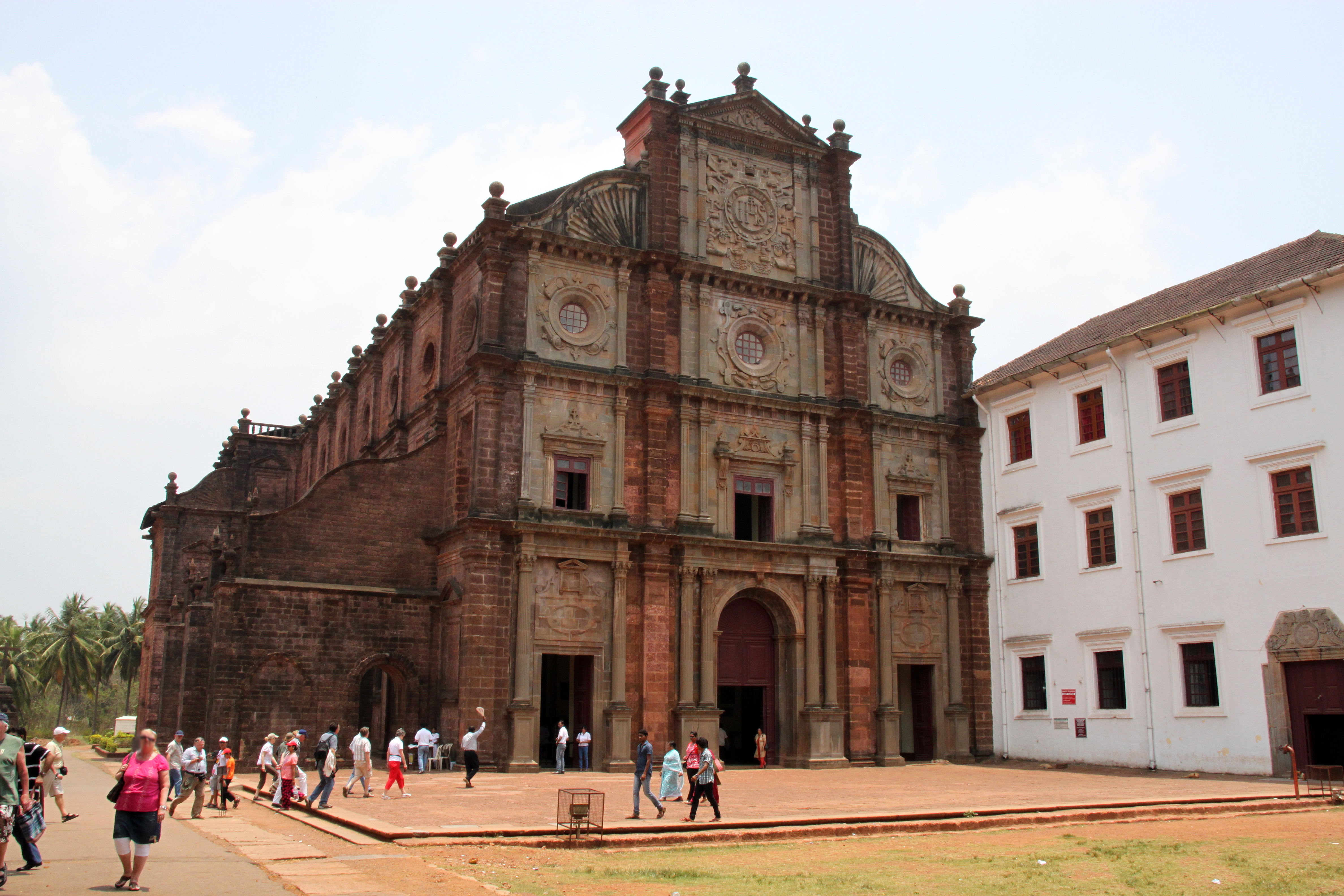 Bom Jesus Goa